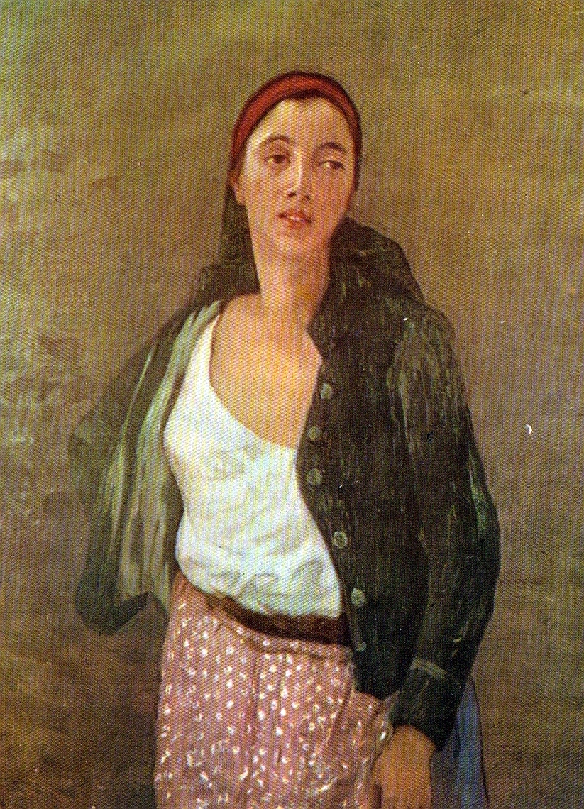 Ştefan Luchian - Safta Florăreasa, ulei pe pânză, 89x65 cm, Muzeul Naţional de Artă al României din Bucureşti